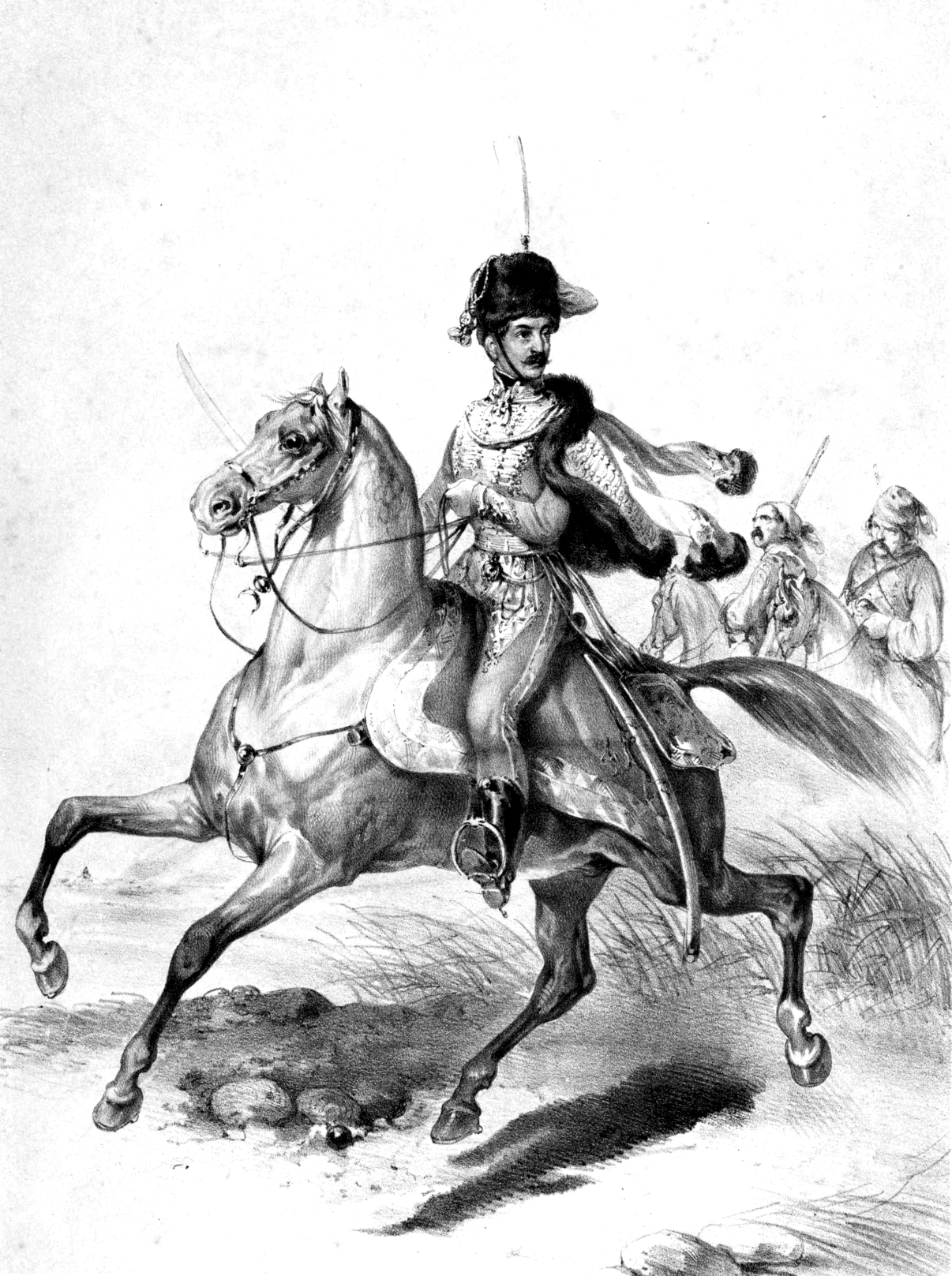 Jellacic de Buzim, Josef Graf (1801 - 1859)